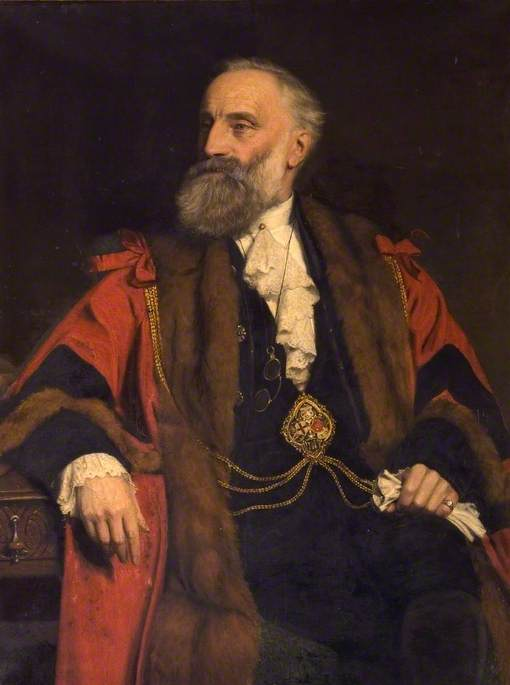 Portrait des britischen Bauunternehmers George Burt